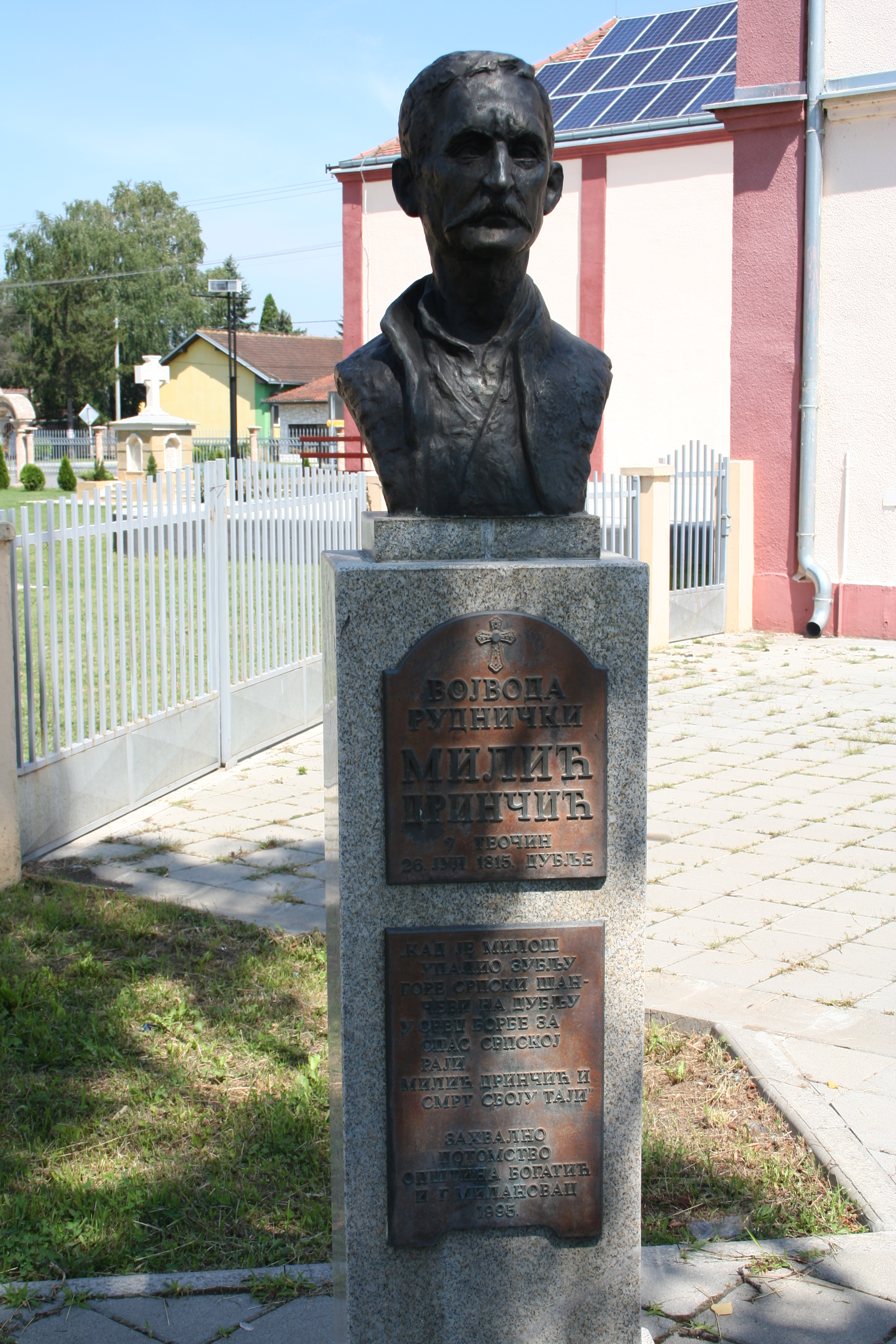 Spomenički kompleks, Dublje